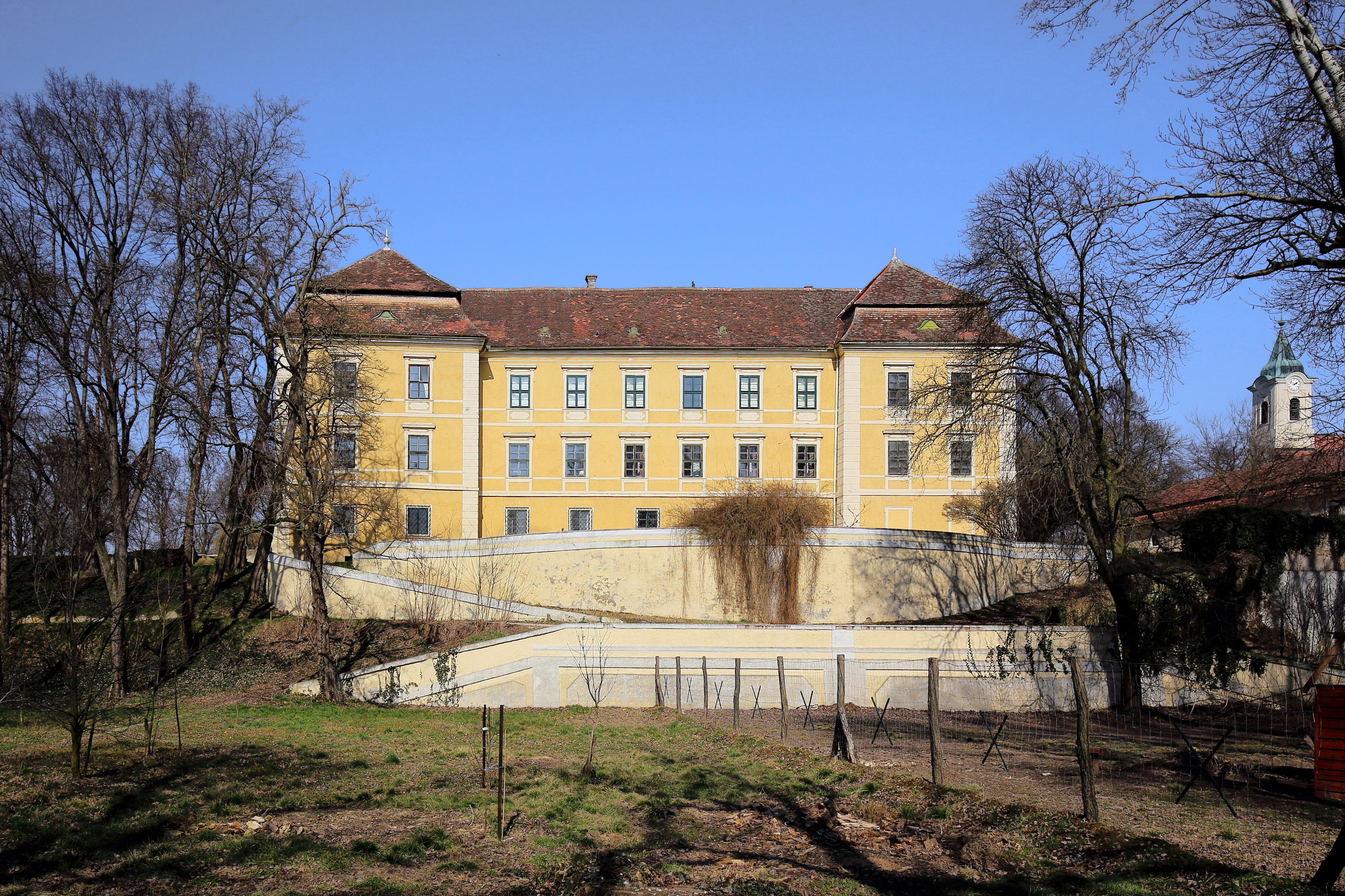 Südtrakt des Schlosses Pellendorf in der niederösterreichischen Marktgemeinde Gaweinstal.